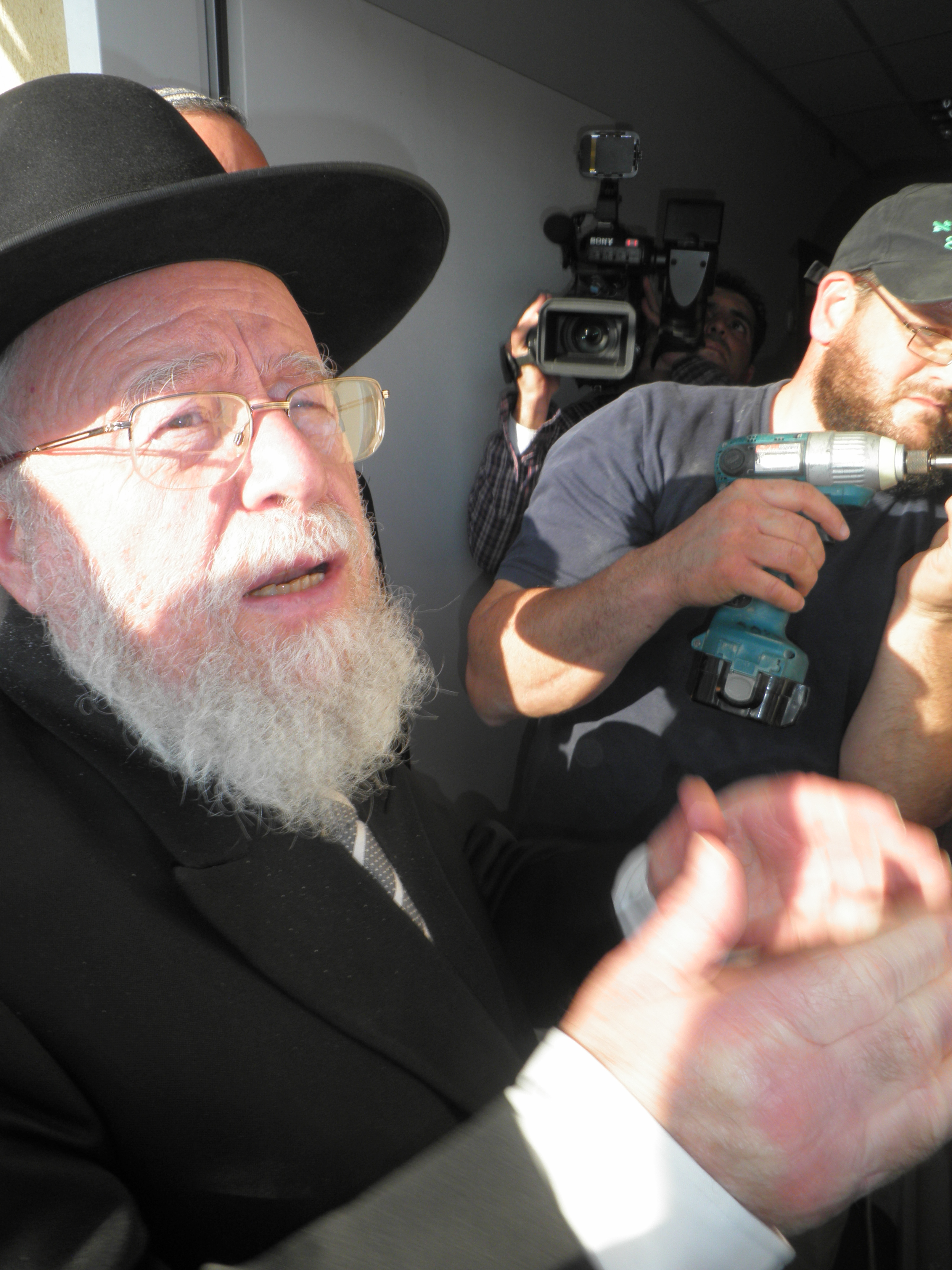 הרב דוב ליאור קובע מזוזה בשבי דרום